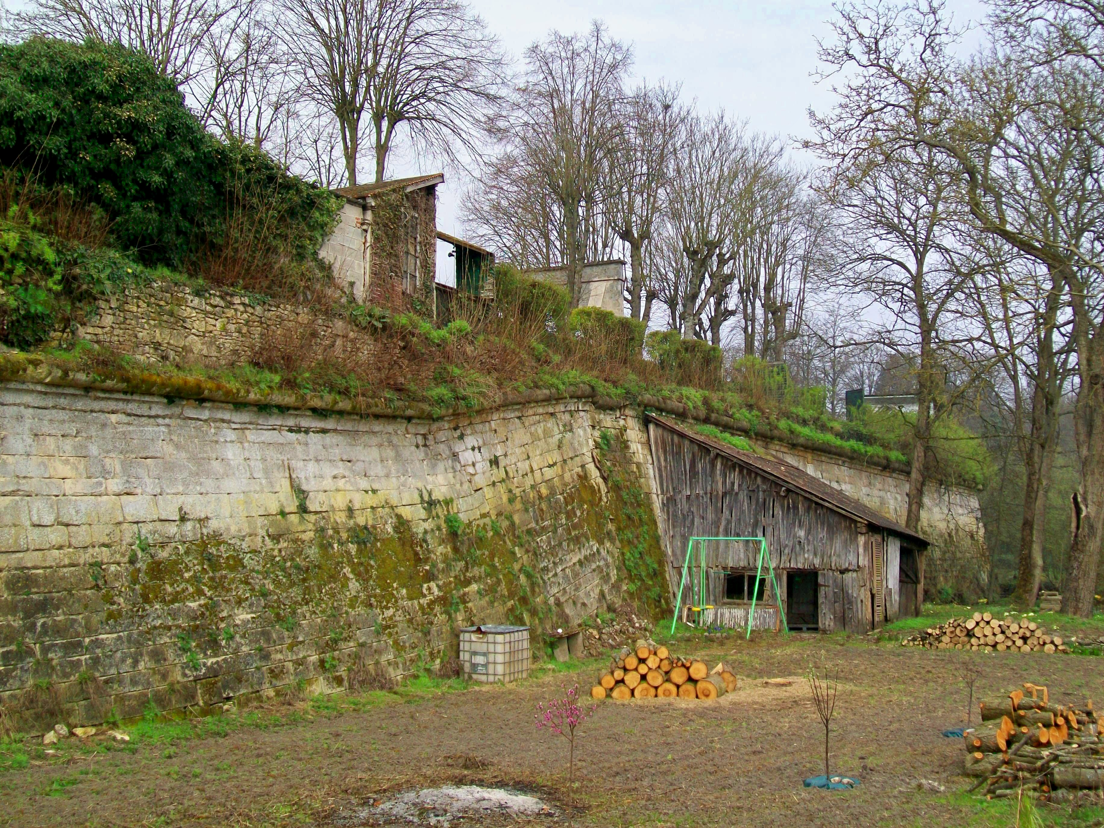 La bastion de la porte de Meaux, ajoutée aux remparts médiévaux après le siège de 1589, ultime renforcement des fortifications de Senlis.